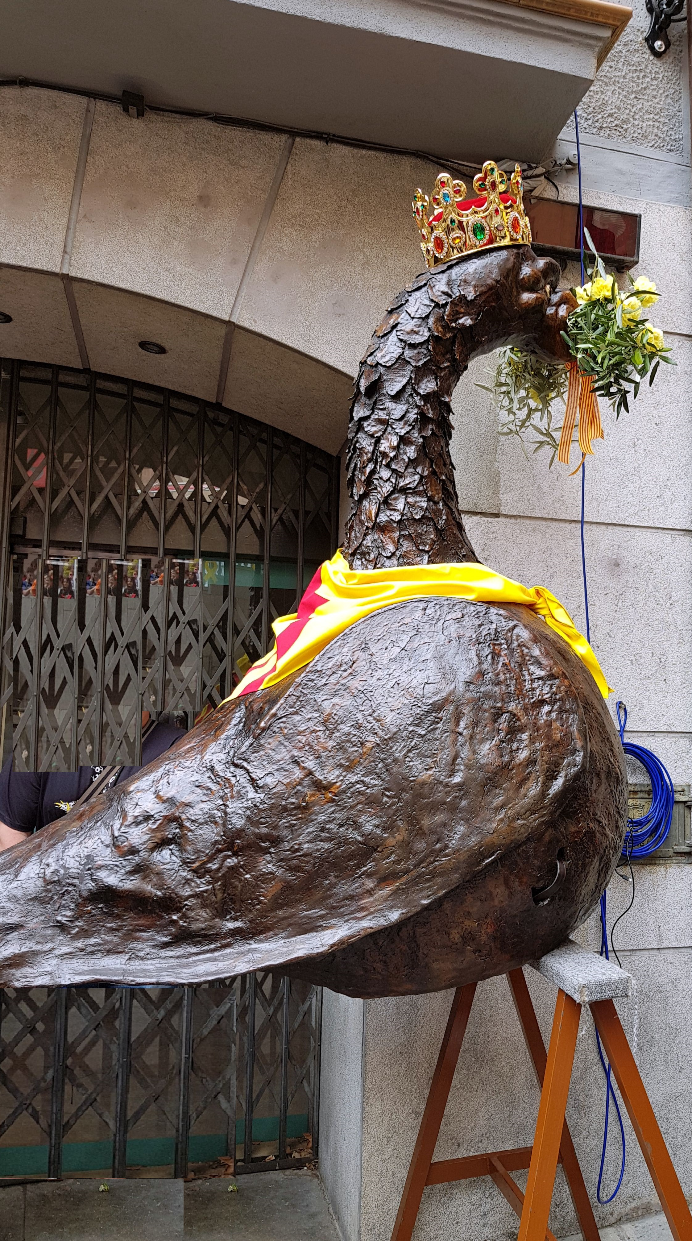 Àguila de la patum de Berga.